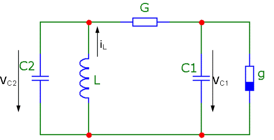 Классическая схема Чуа, выполнена в MicroCap